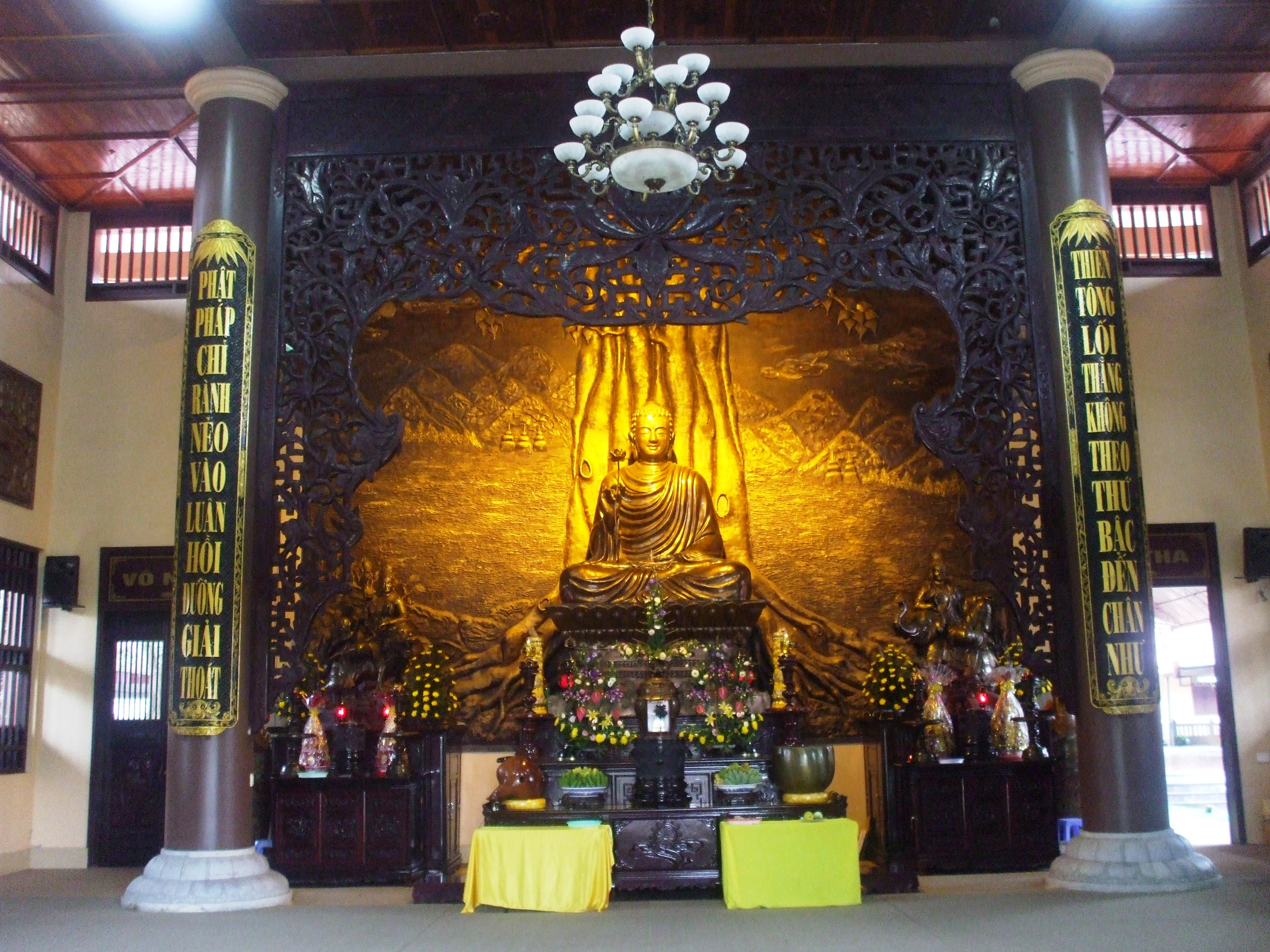 Tượng Phật Thích-ca Mâu-ni trong chính điện Thiền viện Trúc Lâm Yên Tử, còn gọi là Chùa Lân (Uông Bí, Quảng Ninh, Việt Nam).